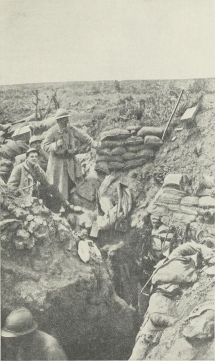 Poste de commandement du bataillon au cours de l'attaque de la Gargousse.